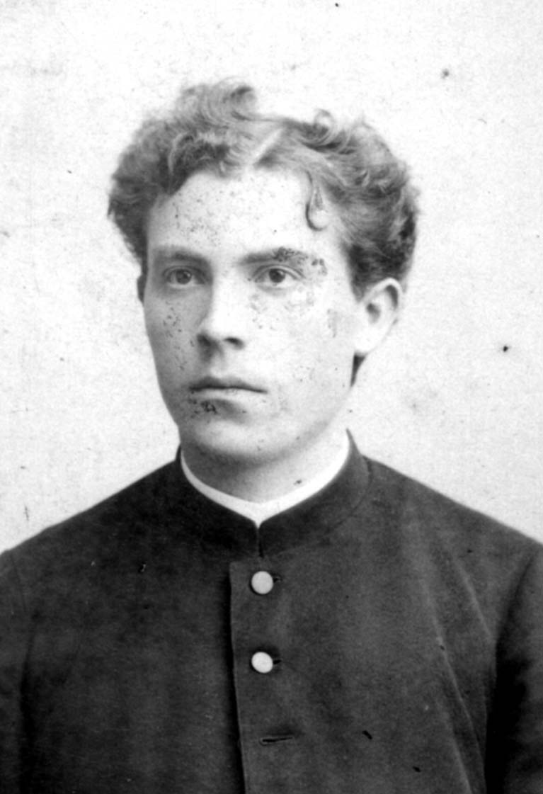 Prälat Martin Hemmer, Speyer und Breslau